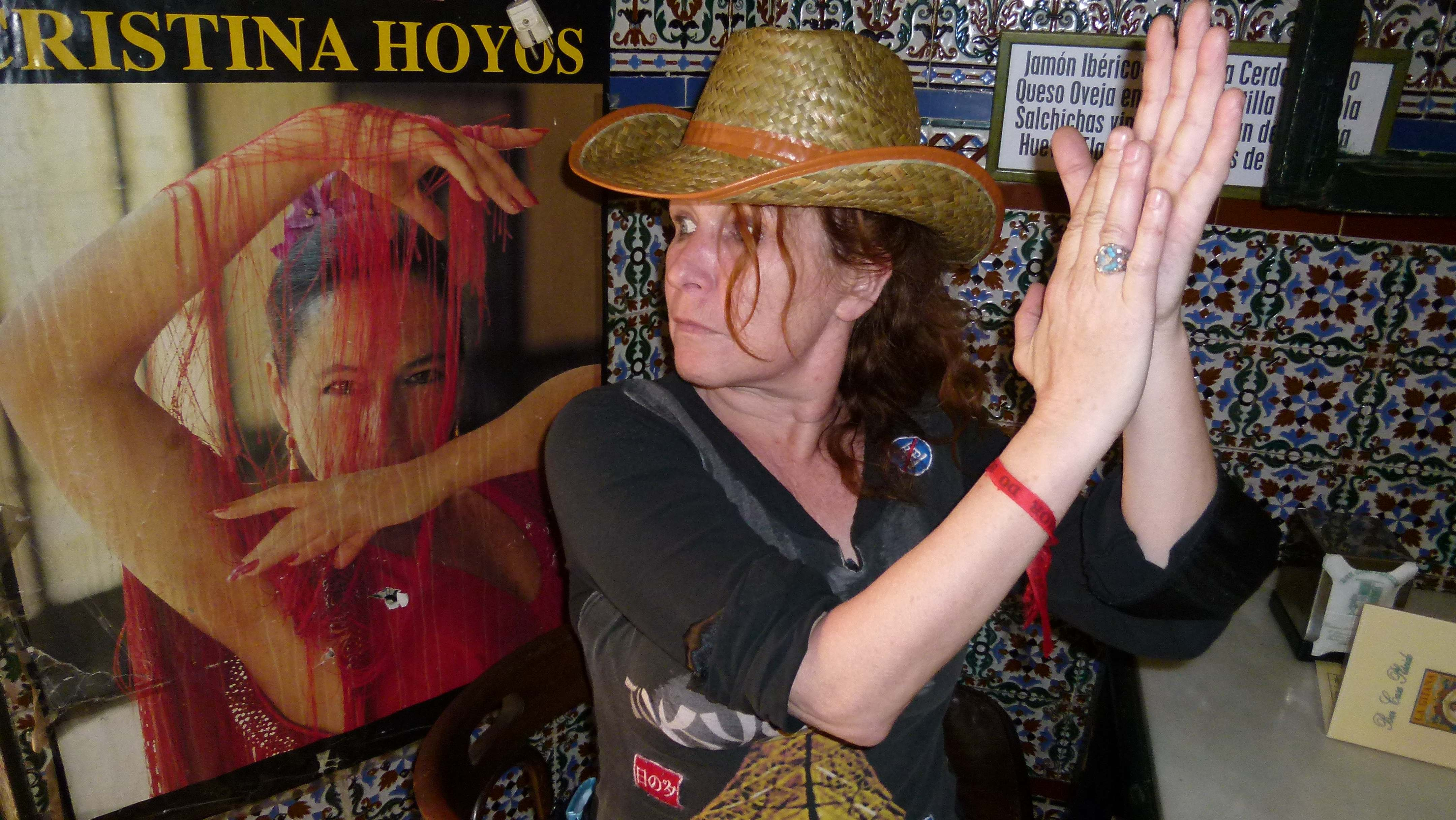 Tosca Niterink (Haarlem, 3 maart 1960) is een Nederlandse actrice, die bekend werd door haar aandeel in Theo en Thea, Kreatief met Kurk en Borreltijd. Deze drie programma's maakte zij met Arjan Ederveen.